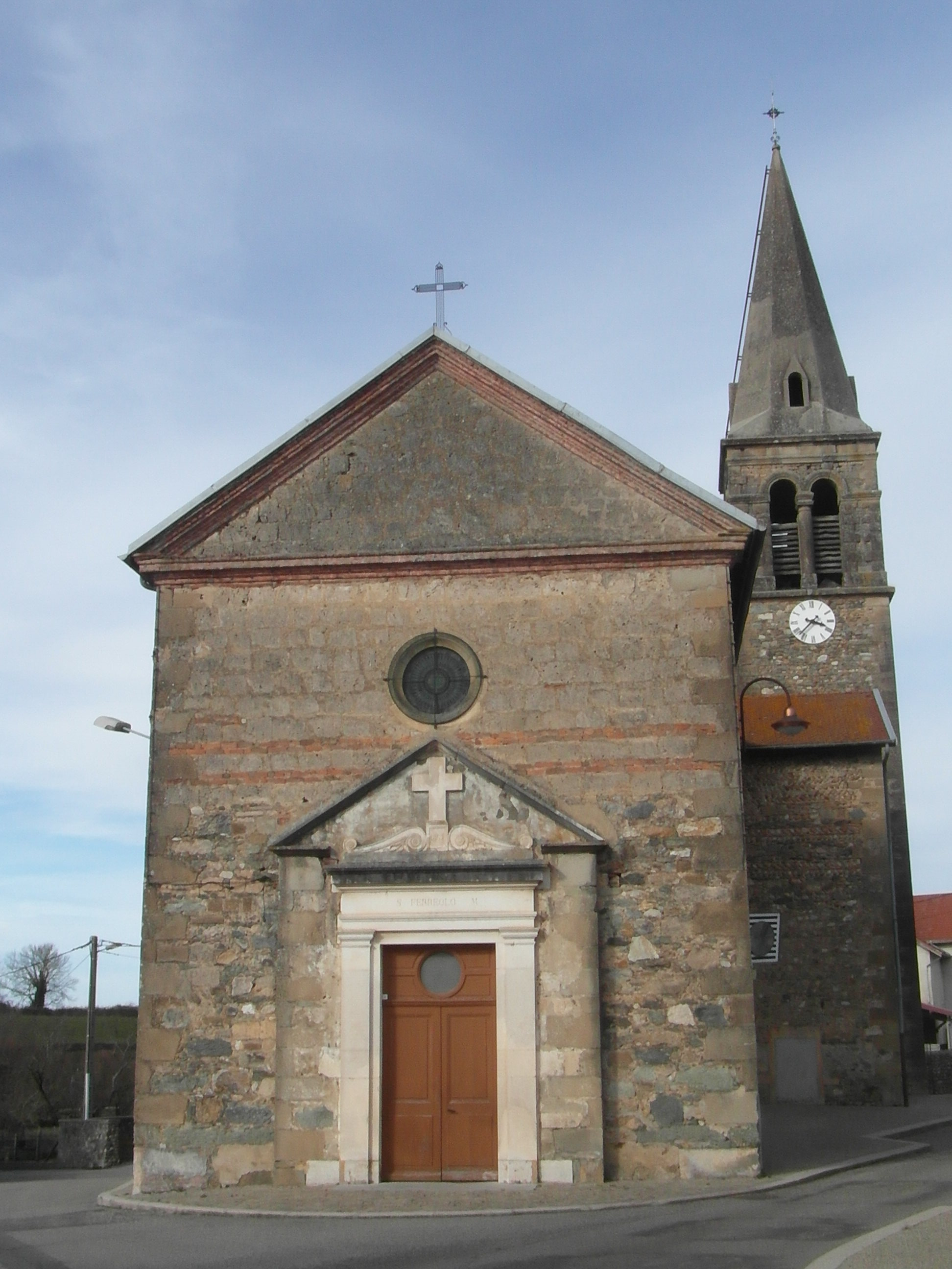 Église de Bizonnes en mars 2019